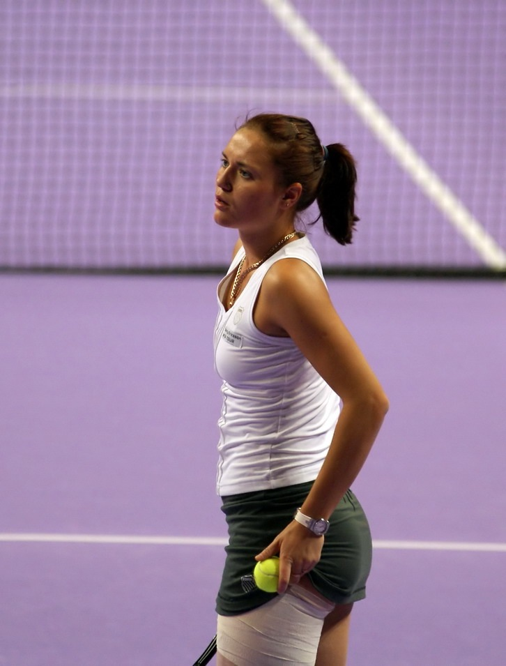 Kateryna Bondarenko in Antwerpen, 2008